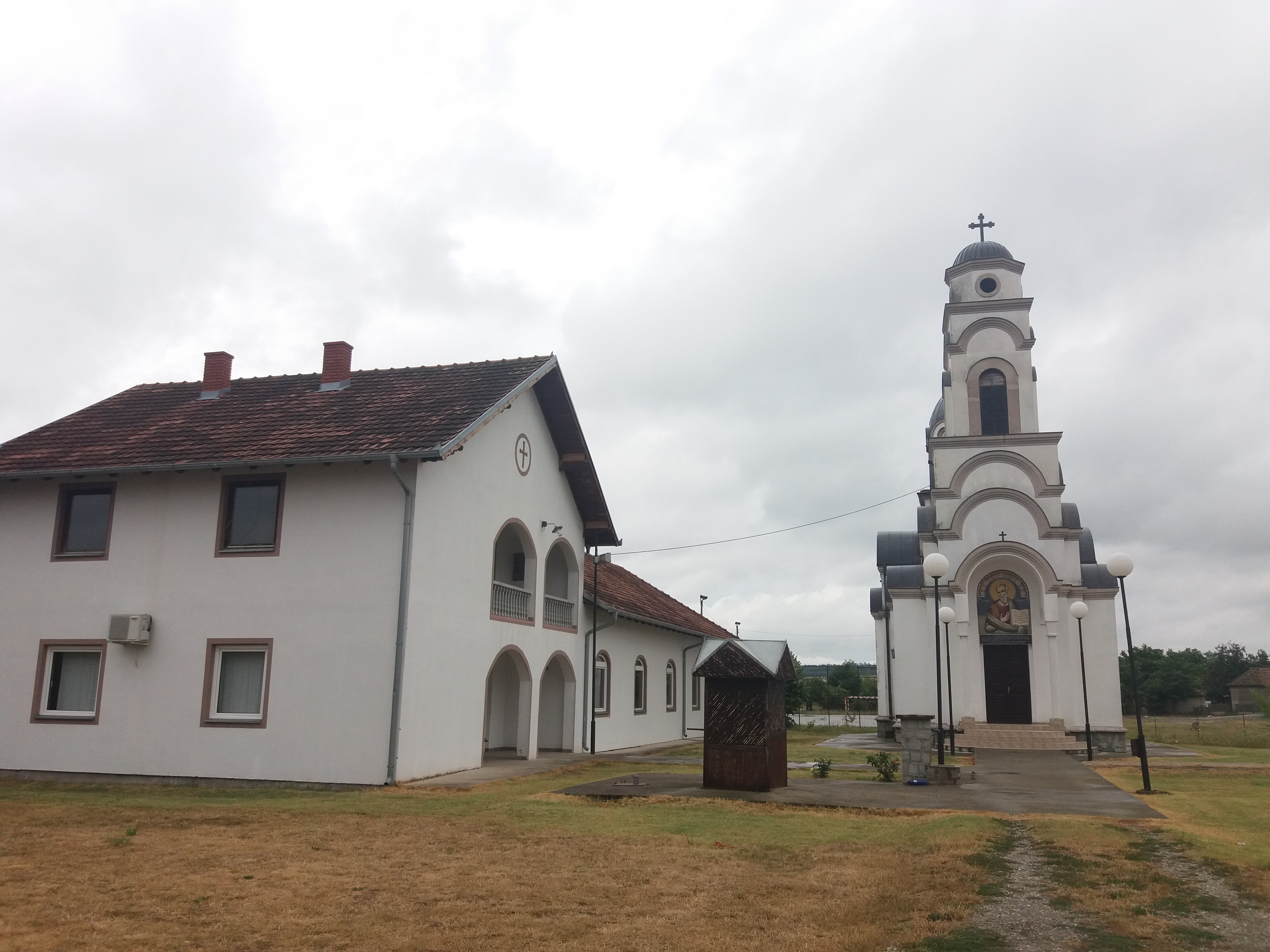 Crkva u Vlaškom Dolu